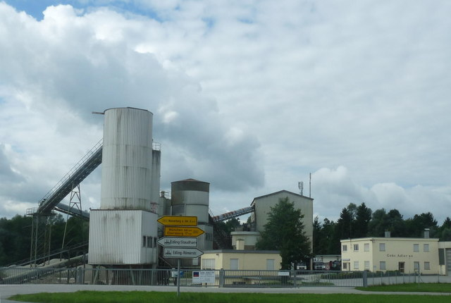 Kieswerk bei Edling